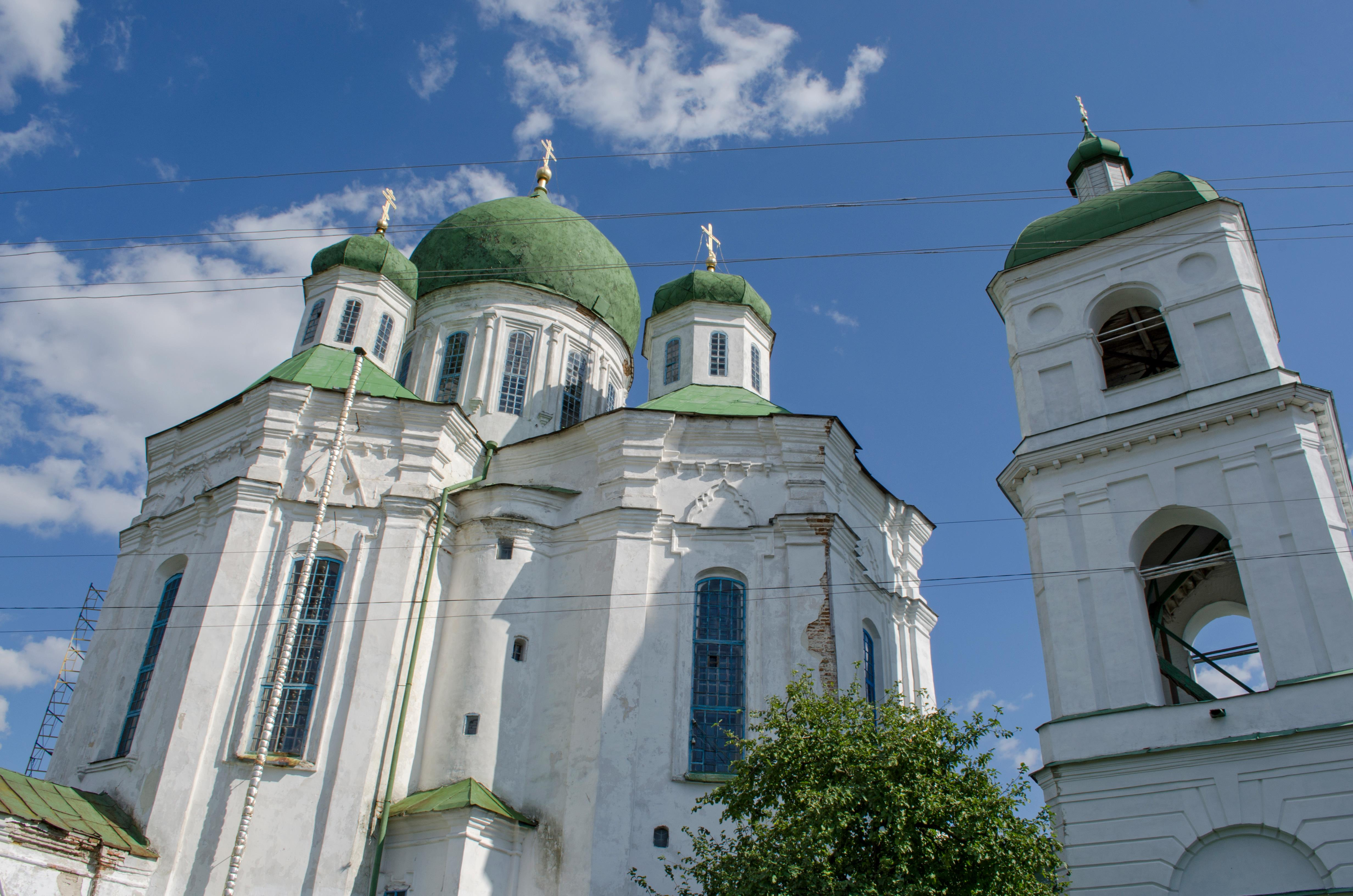 Успенський собор (мур.), Новгород-Сіверський, вул.Р.Люксембург, 3